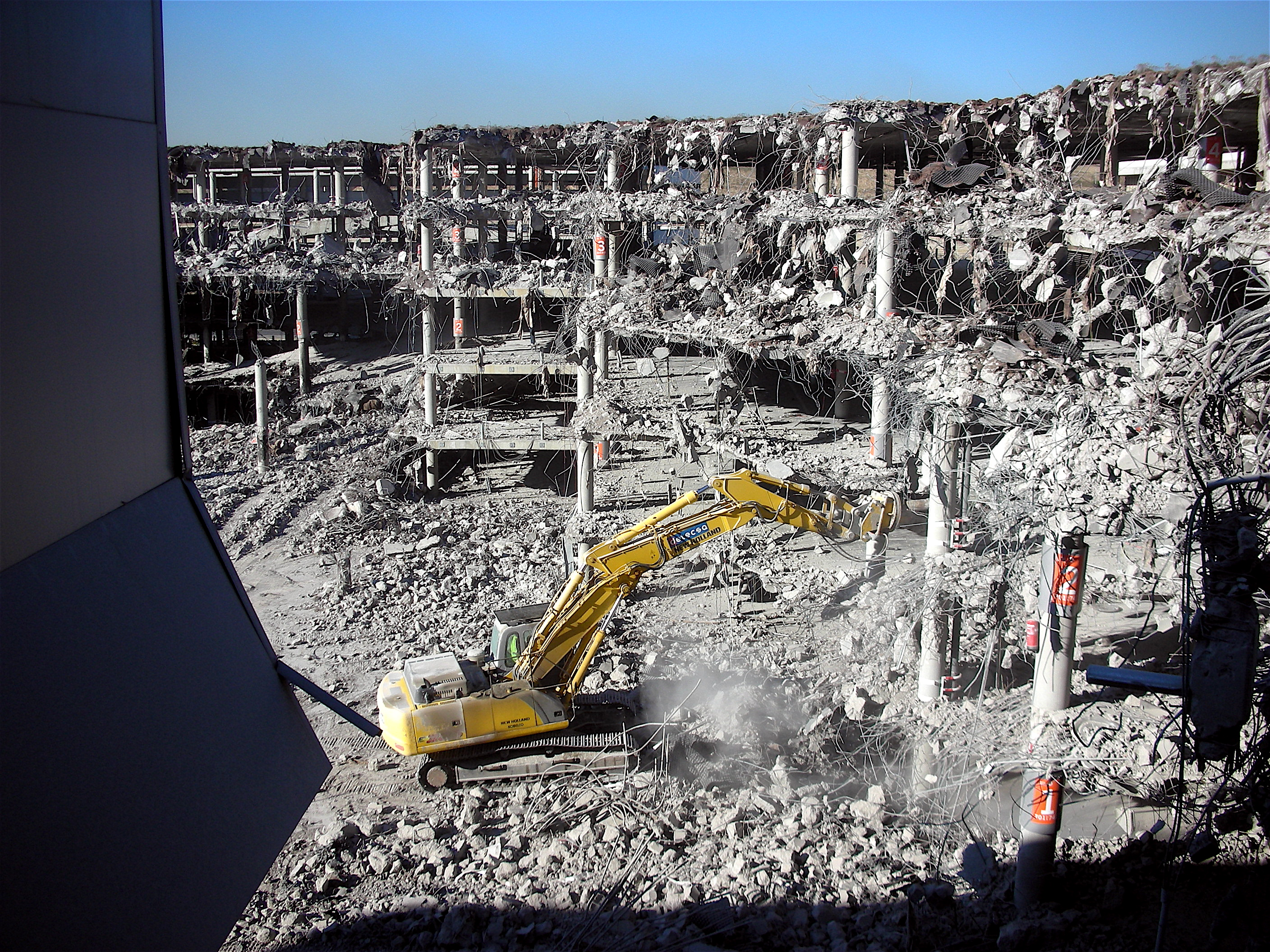 Módulo D del aparcamiento de la Terminal 4 de Barajas, Madrid, el 24 de enero de 2007, 25 días después del atentado de ETA.